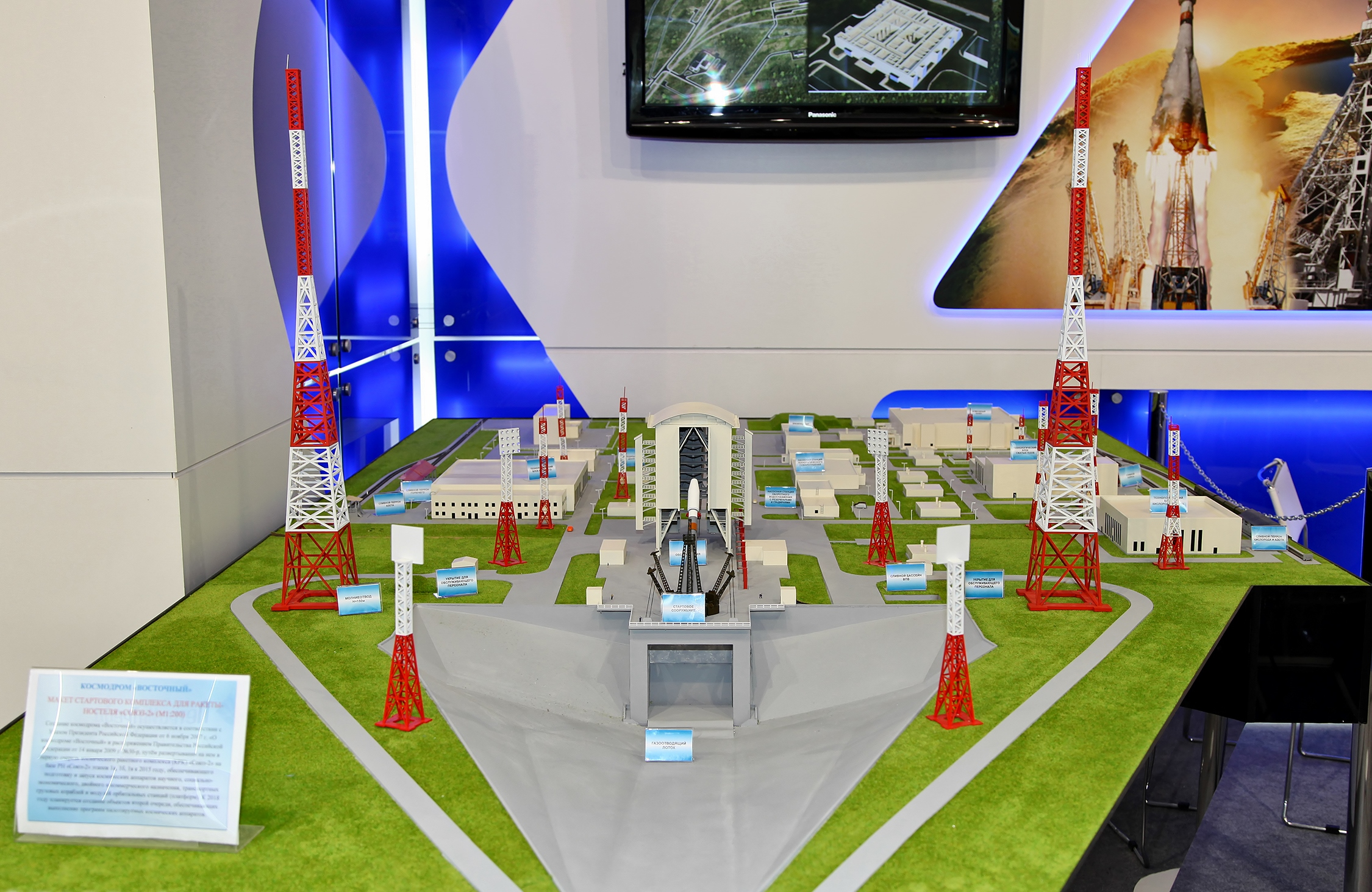 Макет стартового комплекса для ракеты-носителя Союз-2 на космодроме Восточный (Model of launch complex for Soyuz-2 rocket in Vostochny Cosmodrome)